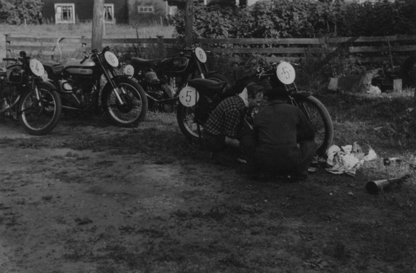 Gardemoen 1949, Svend Aage Sørensen med brækket hals og mekaniker Christensen fra Dansk Excelsior-Henderson Co.